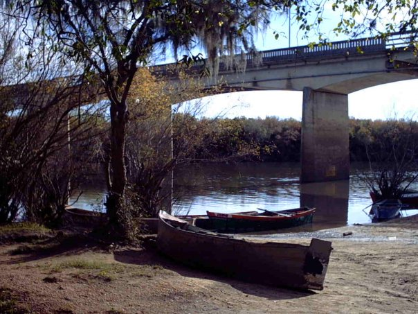 Foto del tradicional "Puente Nuevo" sobre el Río Olimar